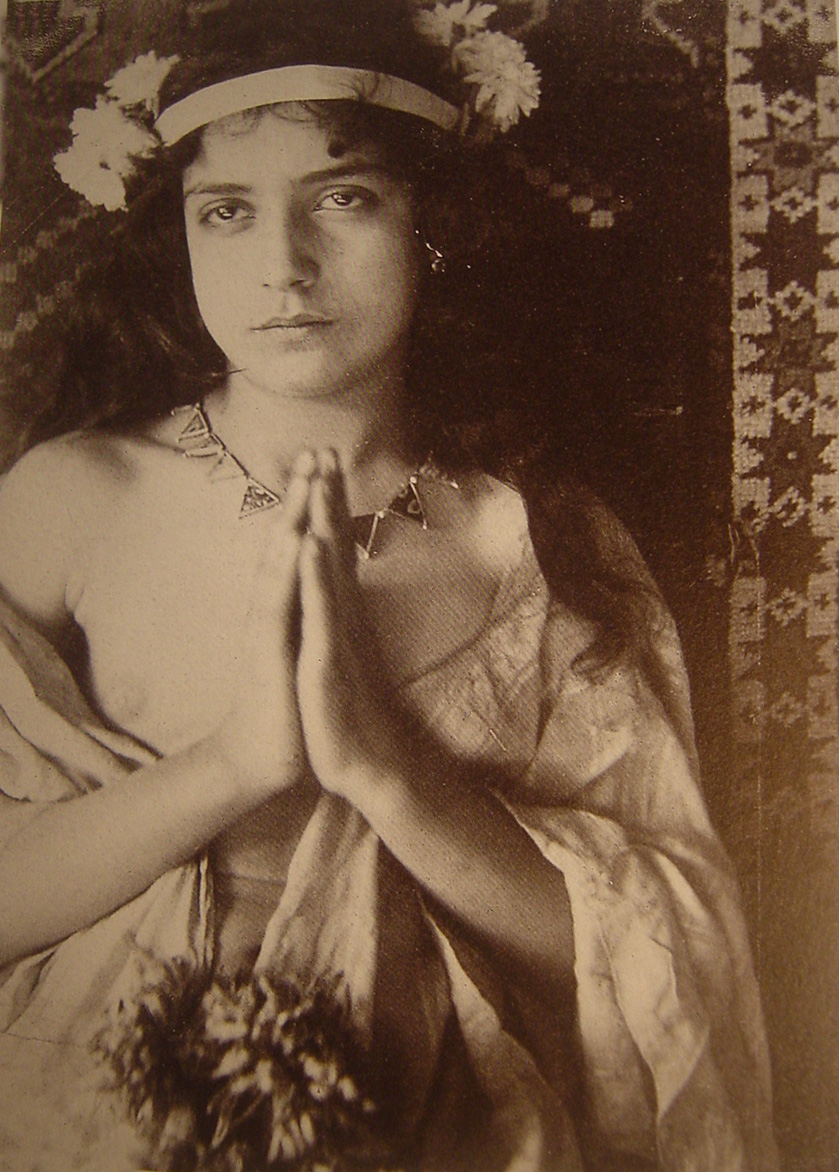 Wilhelm von Plueschow (1852-1930), Donna seminuda in preghiera, Roma, ca. 1900.